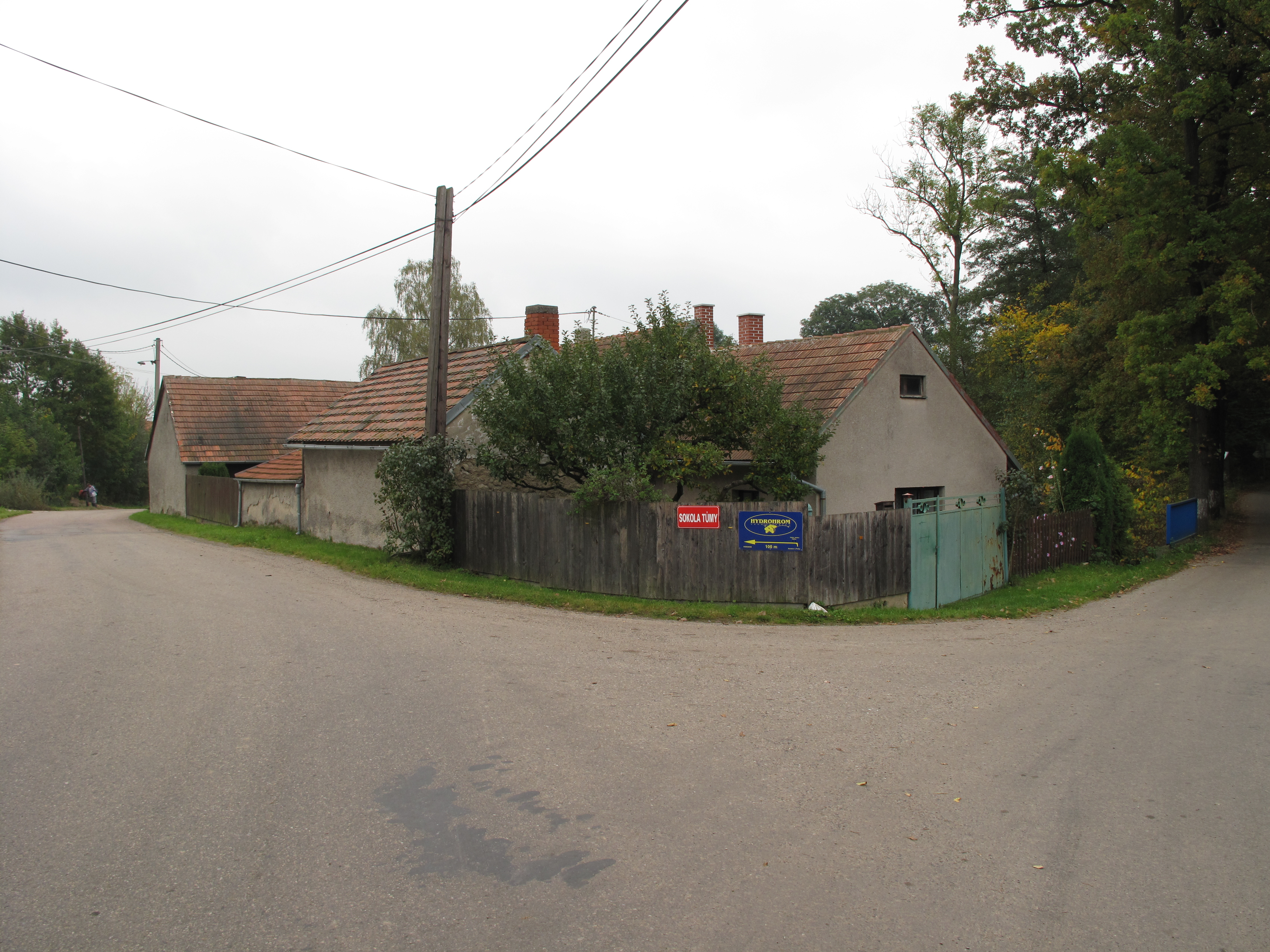 Ulice ve Strženci. Okres Benešov, Česká republika.